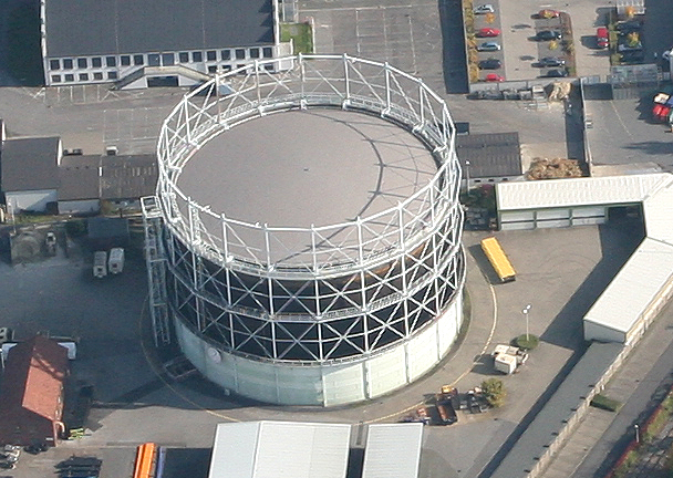 Luftbildaufnahme des Gasometers der Stadtwerke in Hamm